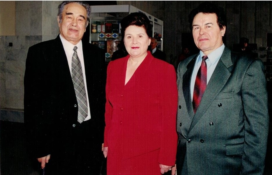 Ильшат Юмагулов, Рашит Низамов и Гузаль Ситдыкова